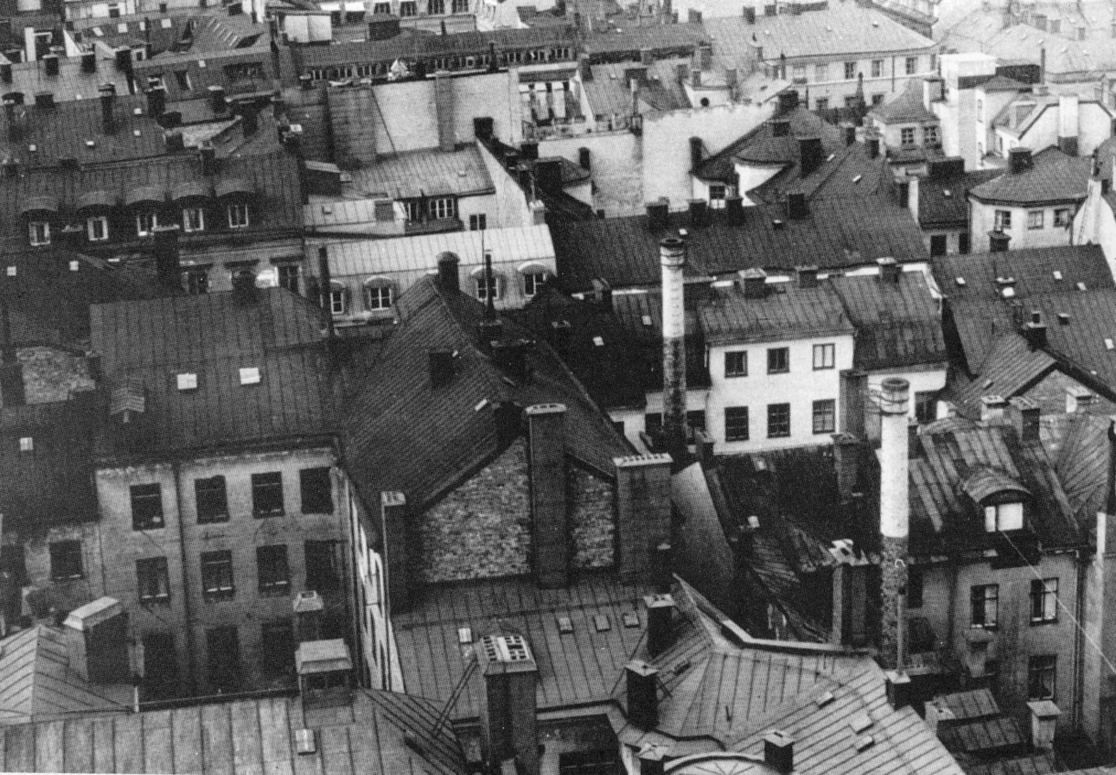 Klarakvarteren i Stockholm, Norrmalm, ca 1930